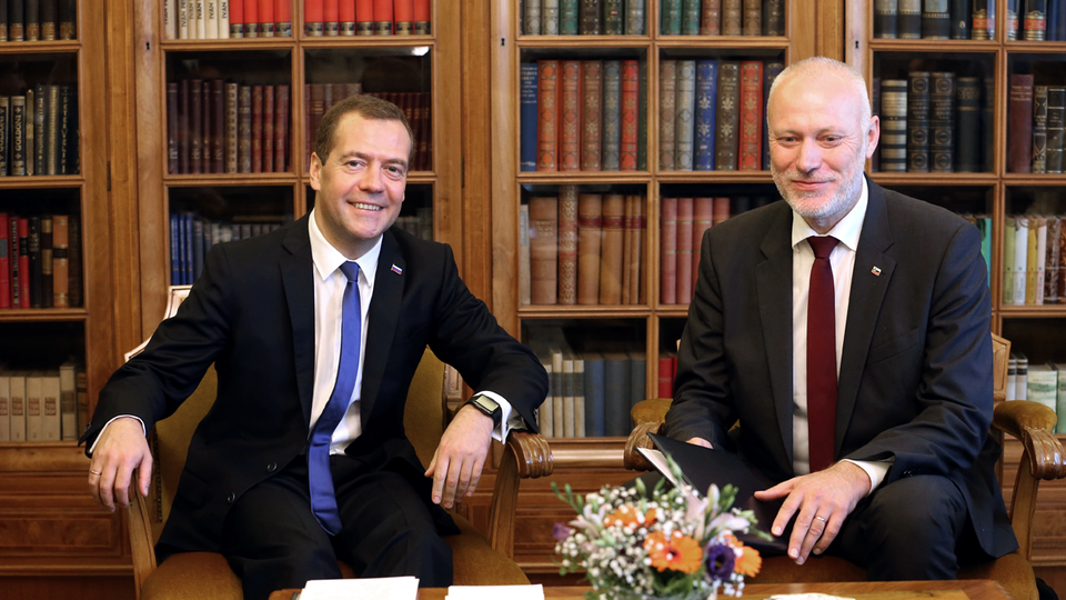 Milan Brglez and Dmitry Medvedev.